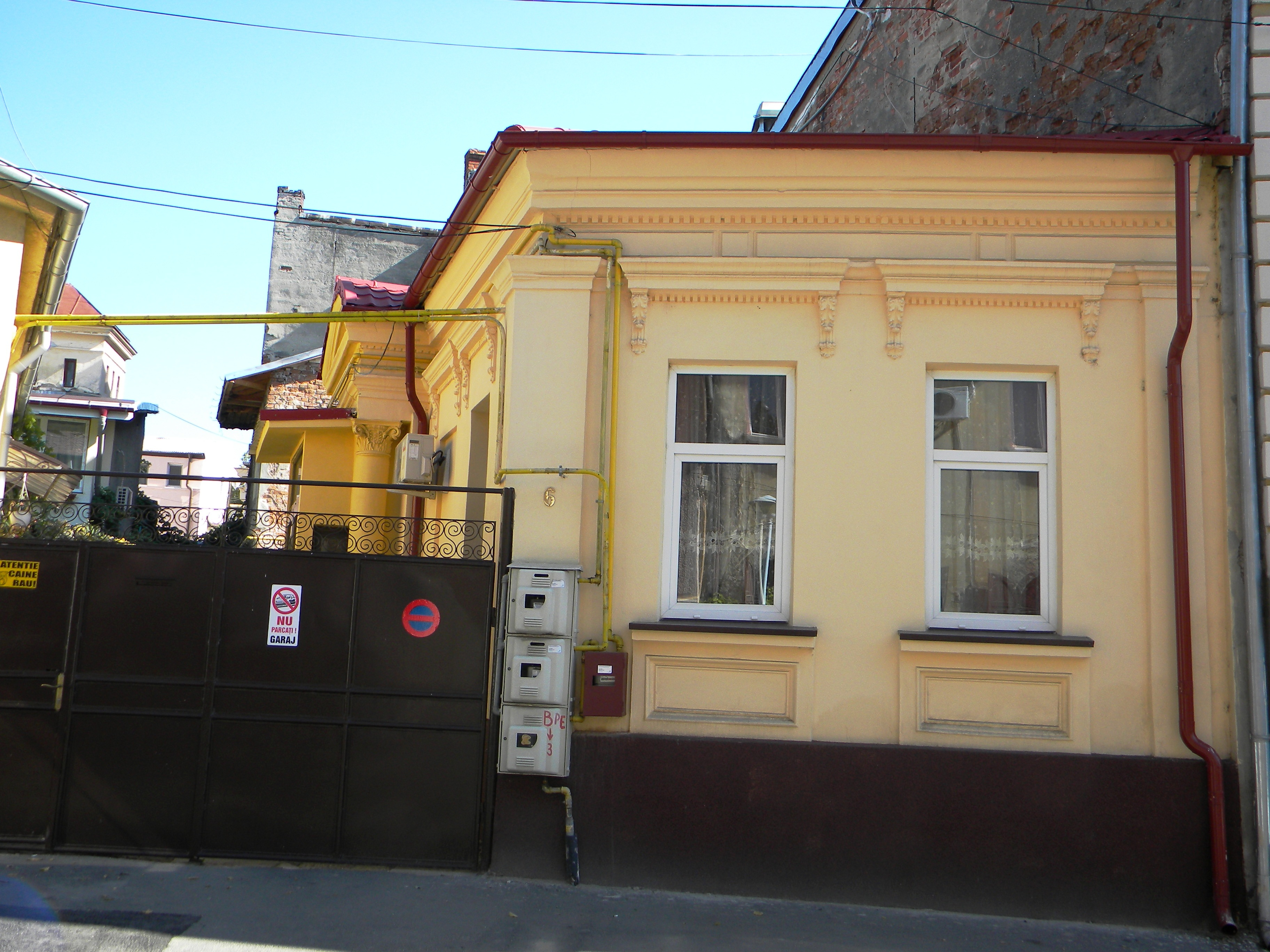 Bucuresti, Romania, Casa pe Str. Iulia Hasdeu nr. 6, sect. 1